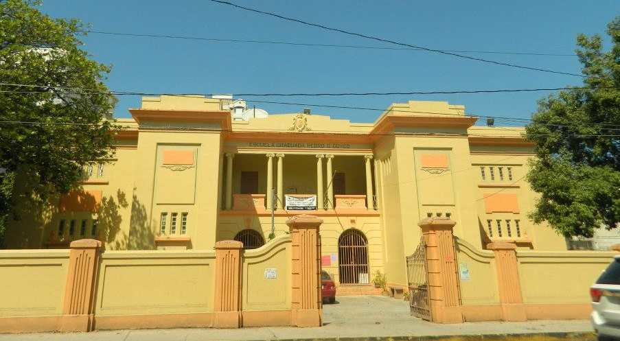 Foto de la escuela Pedro G. Goyco .